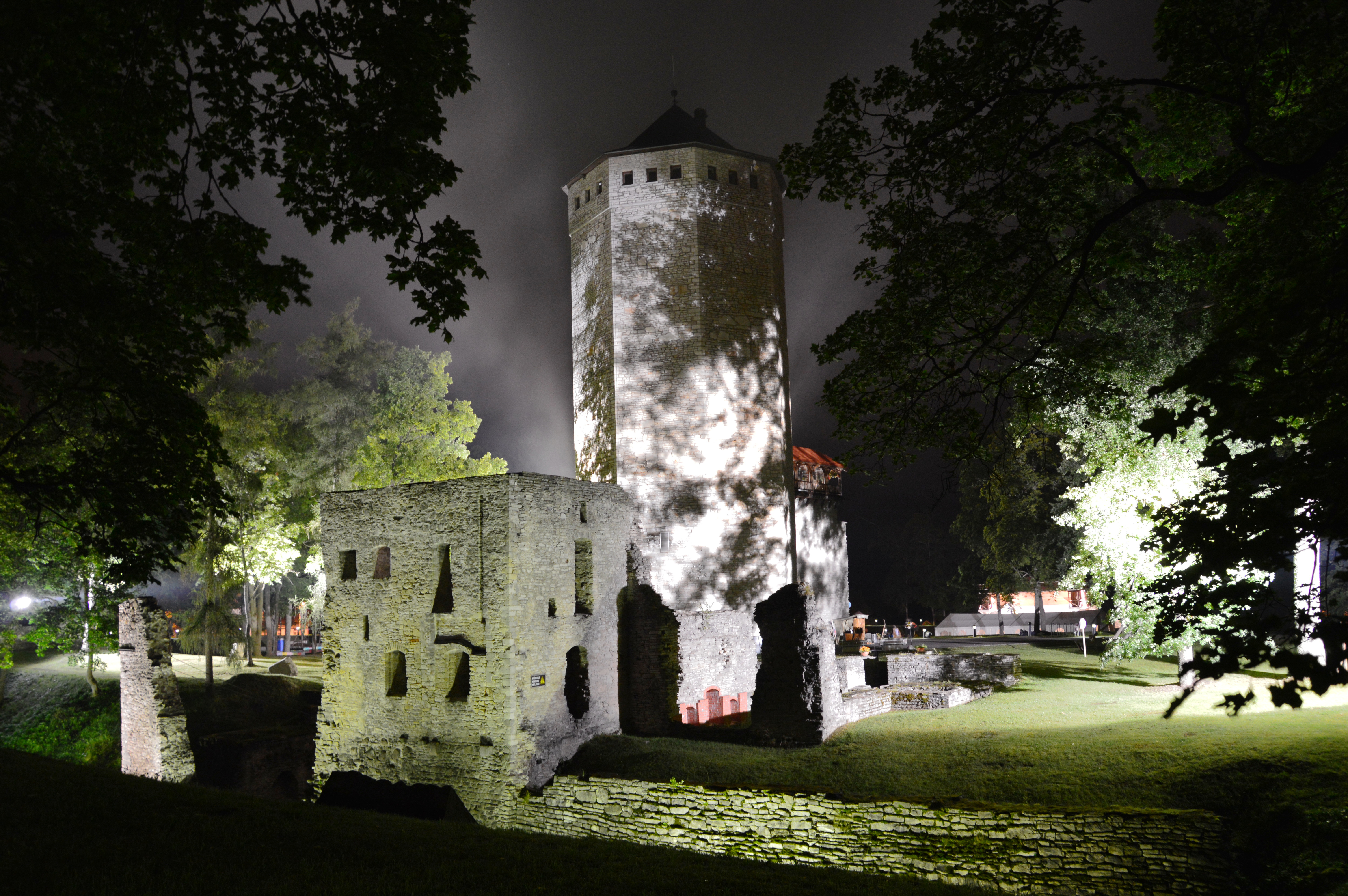 Paide linnuse varemed